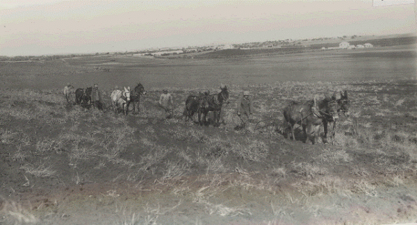 החריש הראשון באדמת נתניה, ברקע חוות פרדס הגדוד.